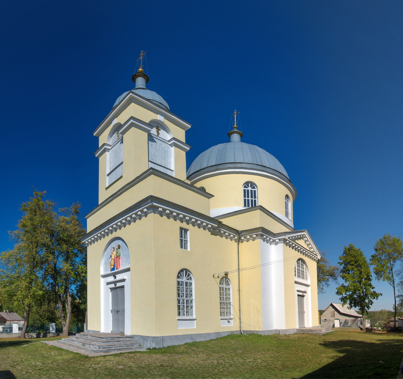 Петропавлівська церква, с. Барашівка, вул. Першотравнева